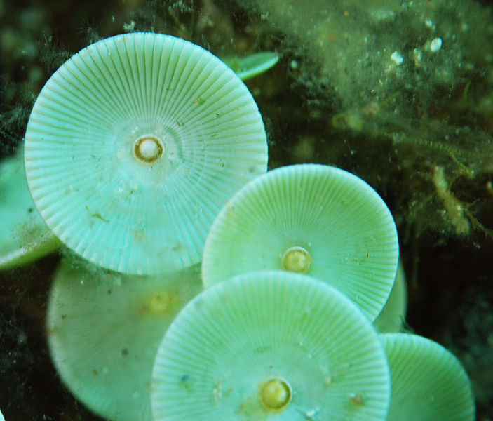 acetabularia meditarranea